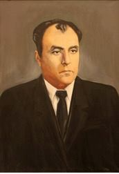 Պետրոսյան_Շահեն_Նիկոլայի